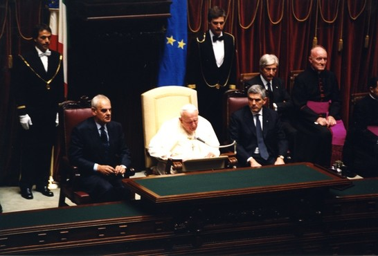 Visita di Sua Santità Giovanni Paolo II al Parlamento italiano